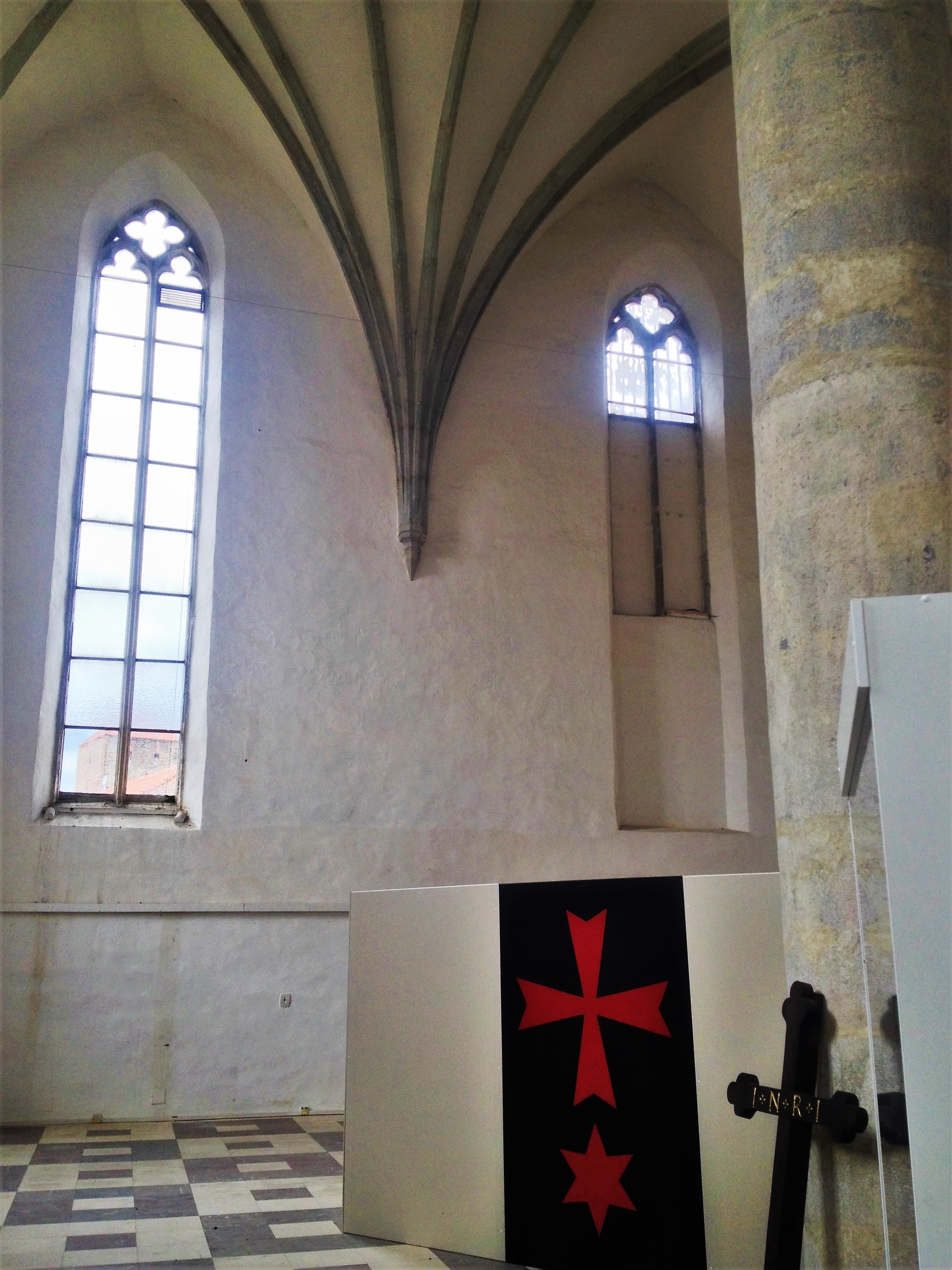 centrální pilíř